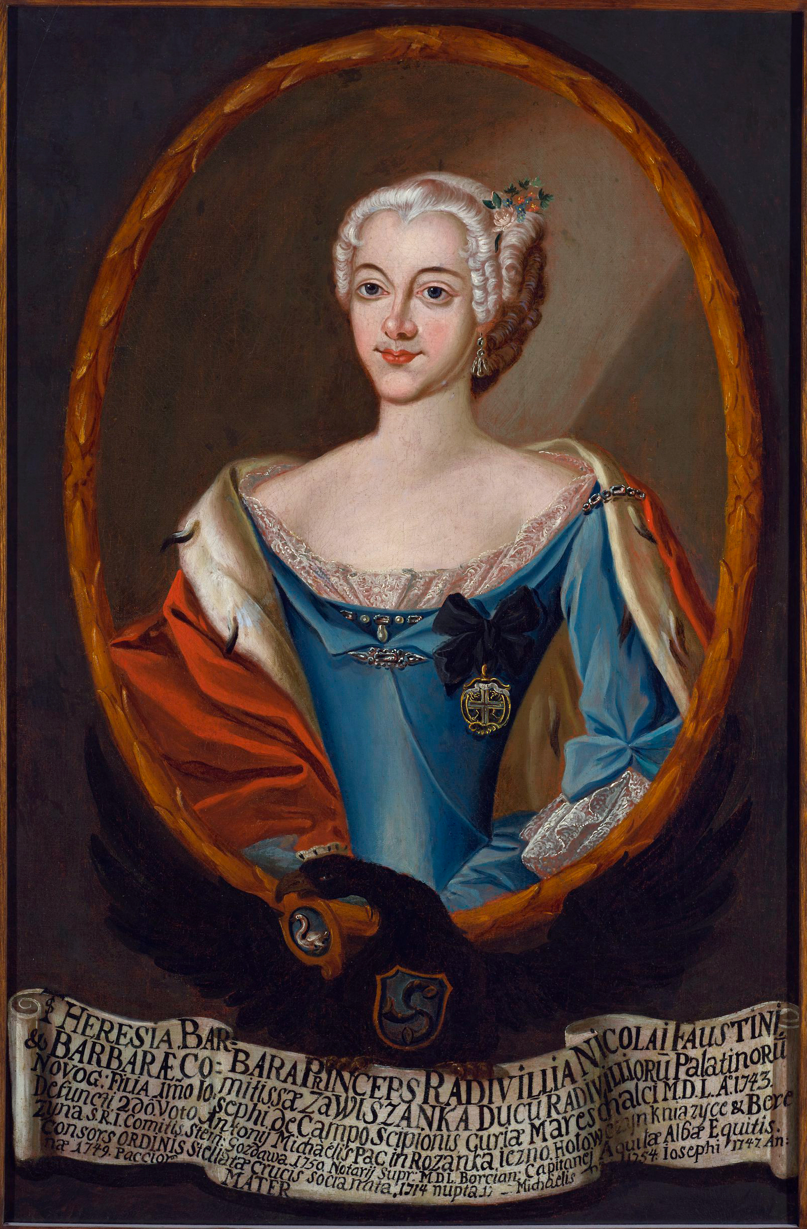 Беларуская (тарашкевіца): Партрэт Тэрэзы Барбары Пац (Tereza Barbara Pac) з роду Радзівілаў (Radzivił)